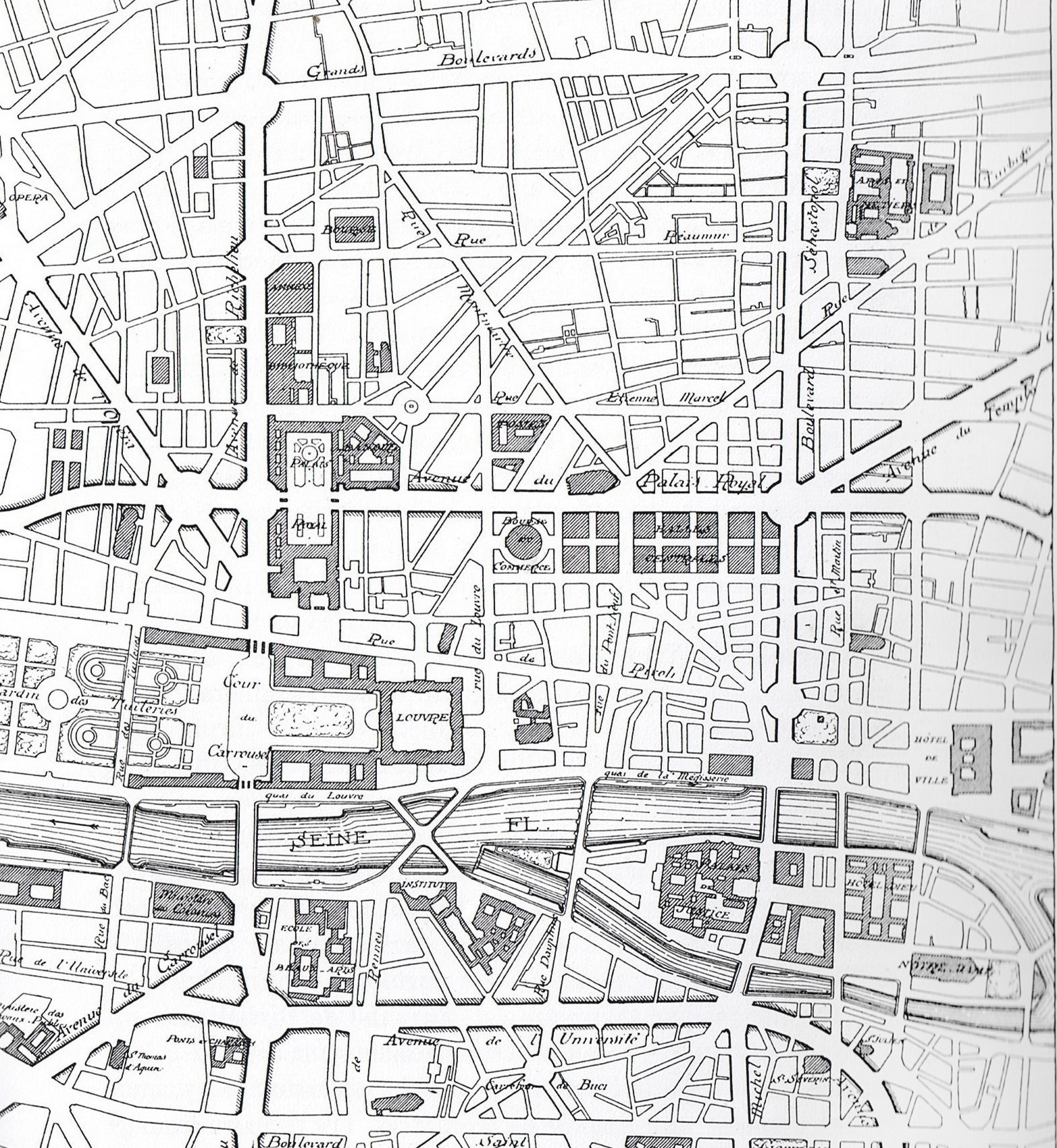 Plan de la grande croisée de Paris incluant la transformation du Palais-Royal.